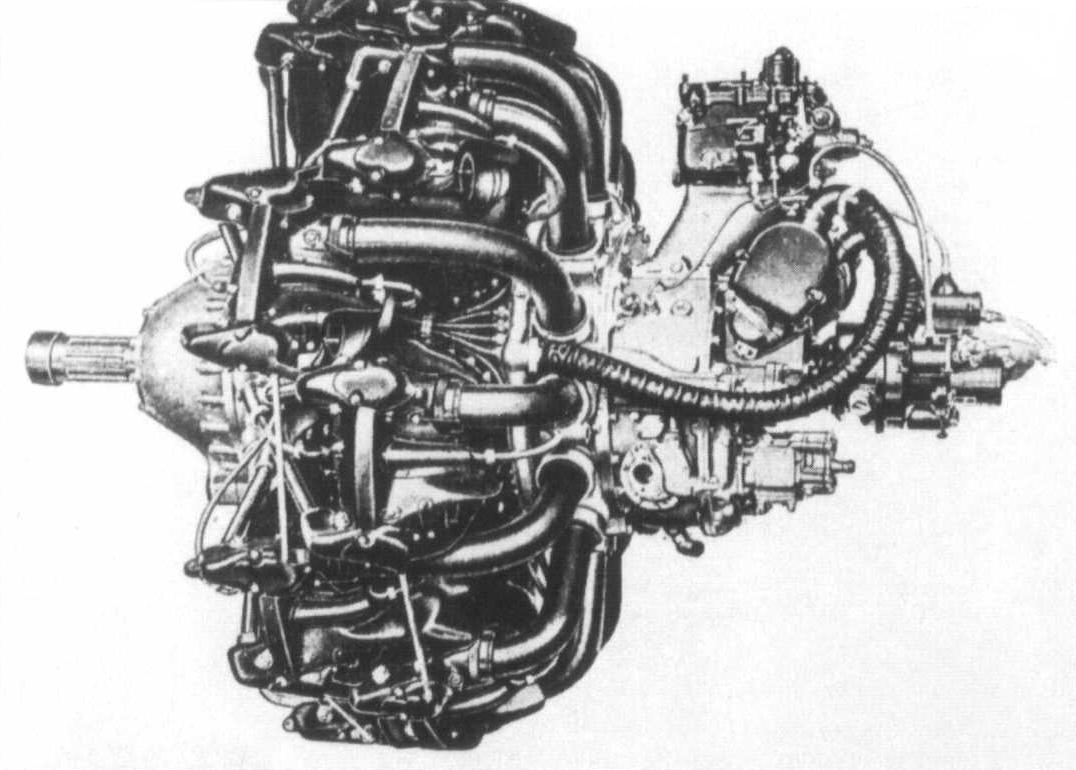 Mitsubishi Kasei 11 Engine